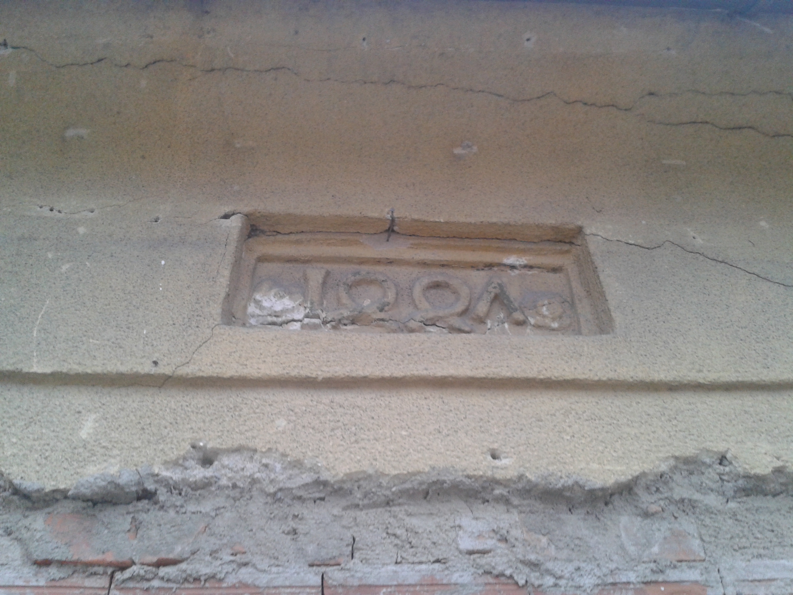 Wohnhaus, ehem. Synagoge